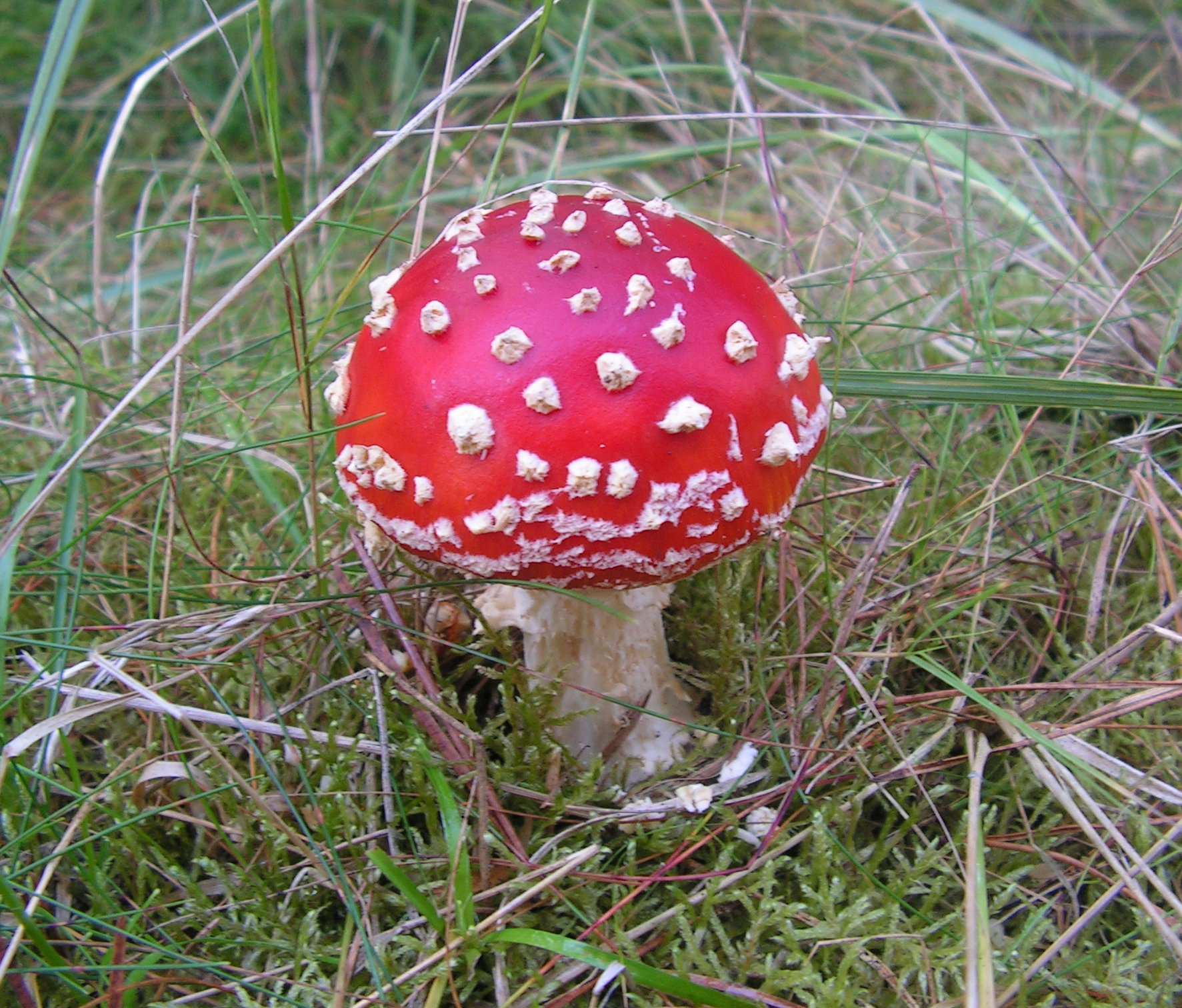 Amanita muscaria